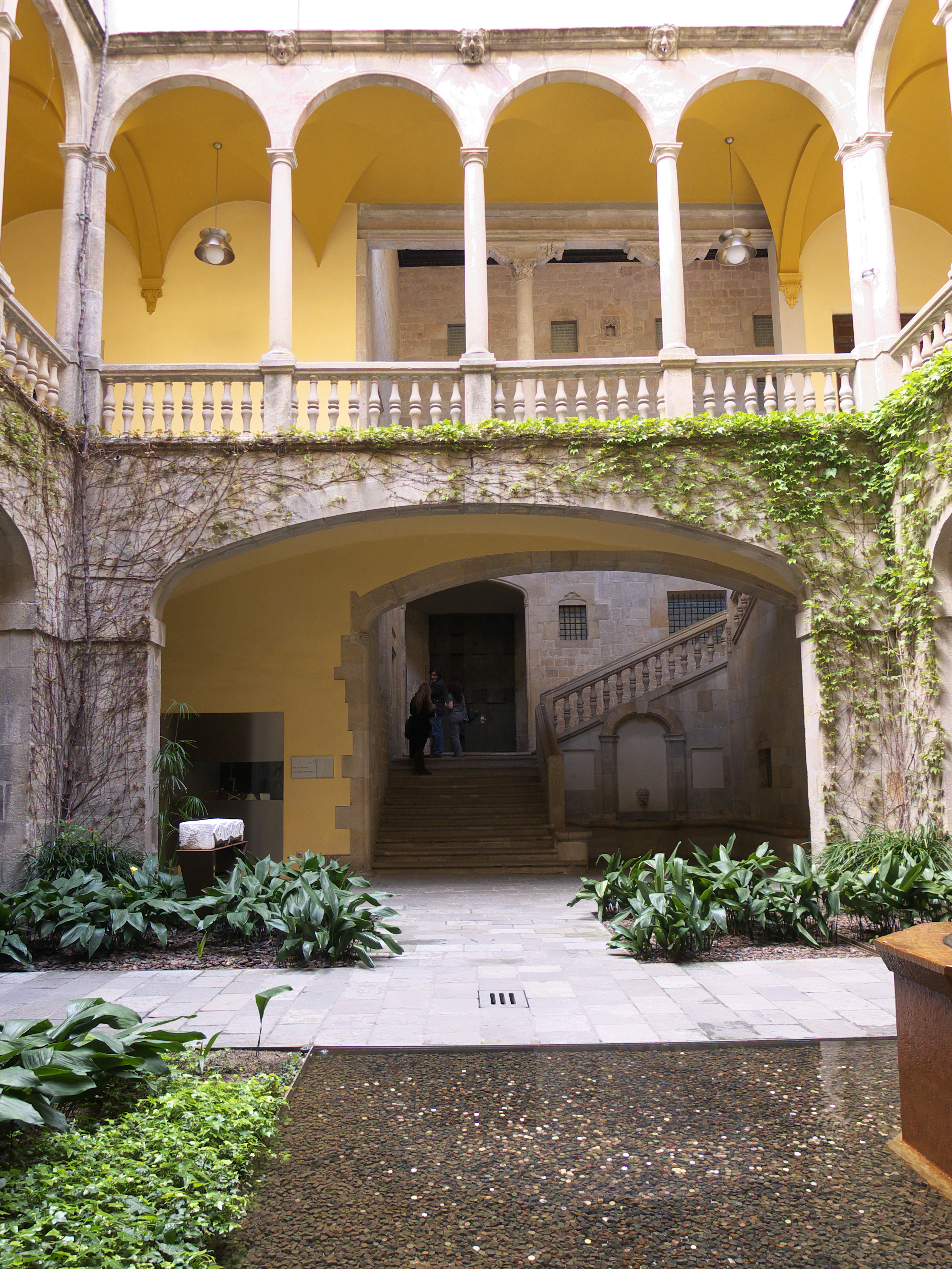 Sede del Archivo de la Corona de Aragón